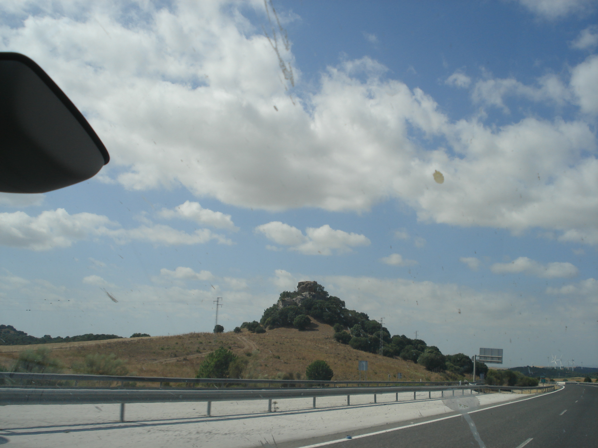 Castillo de Berroquejo en Jerez de la Frontera (España)